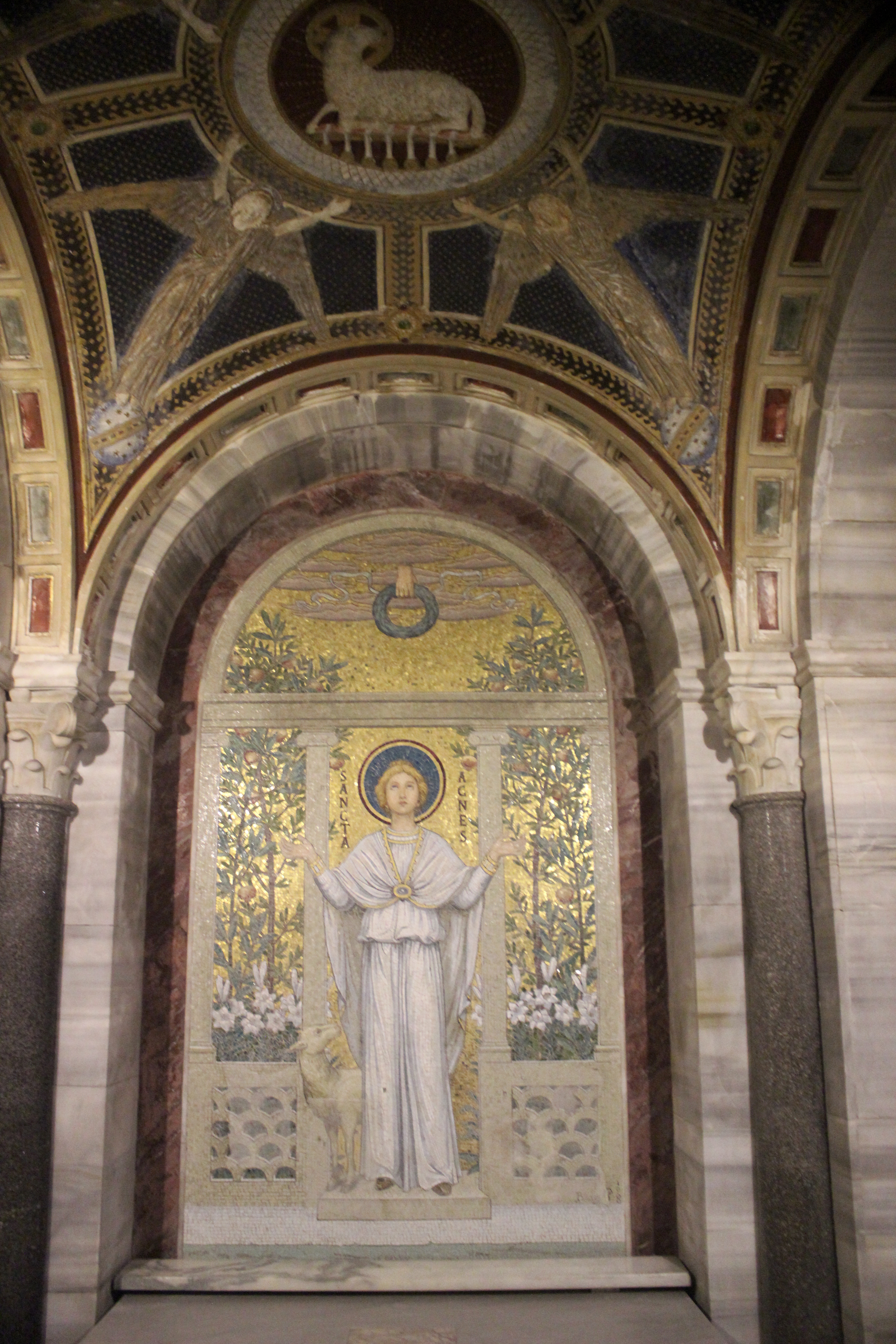 Roma. Santa Cecilia in Trastevere. Cripta.